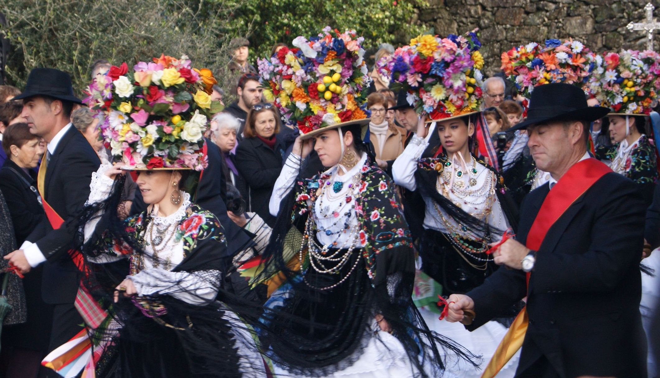 Danza de San Sebastián, bailada cada 20 de xaneiro en Aldán (Cangas, Pontevedra). Catalogada como festa de interese turístico baixo o lema “Danza ancestral de Aldán”, constitúe segundo os etnólogos e musicólogos unha danza votiva da fecundidade, cristianizada baixo a advocación do soldado romano mártir san Sebastián: música, pasos e indumentaria retrotráennos a épocas medievais e incluso anteriores.